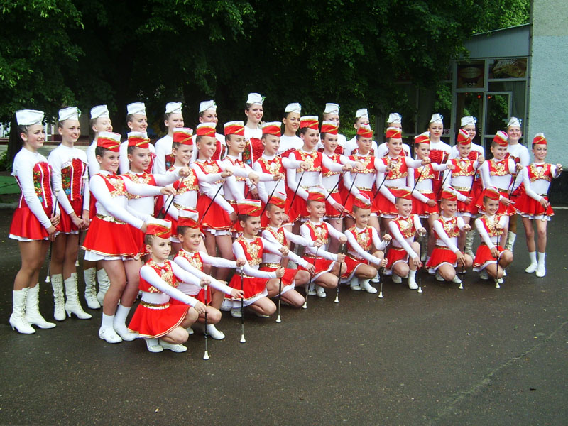 Група "Міні-Альфа" після виступу у 2013 році